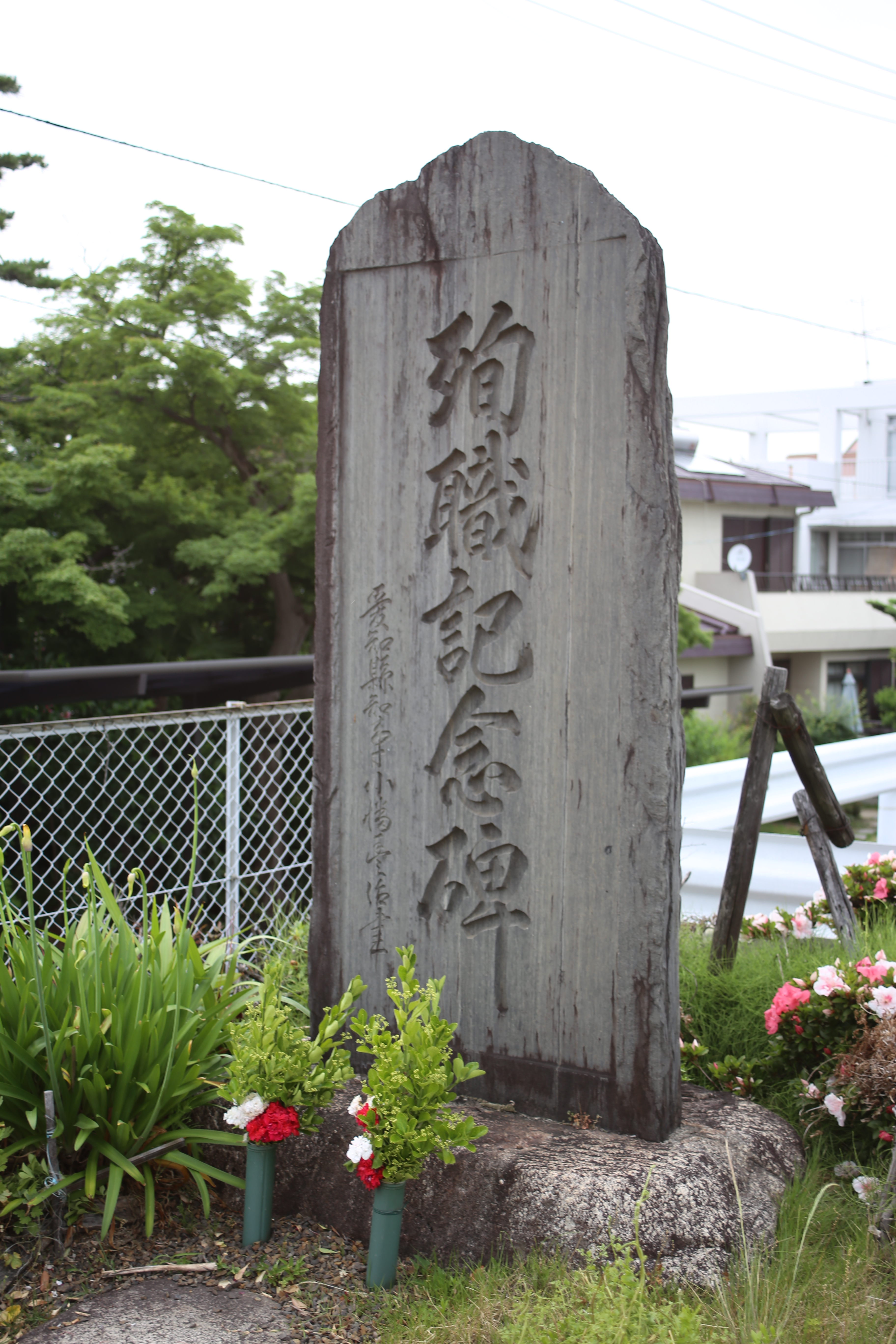 名古屋市西区山木二丁目の平田橋事件殉職記念碑を南側公道西側より撮影